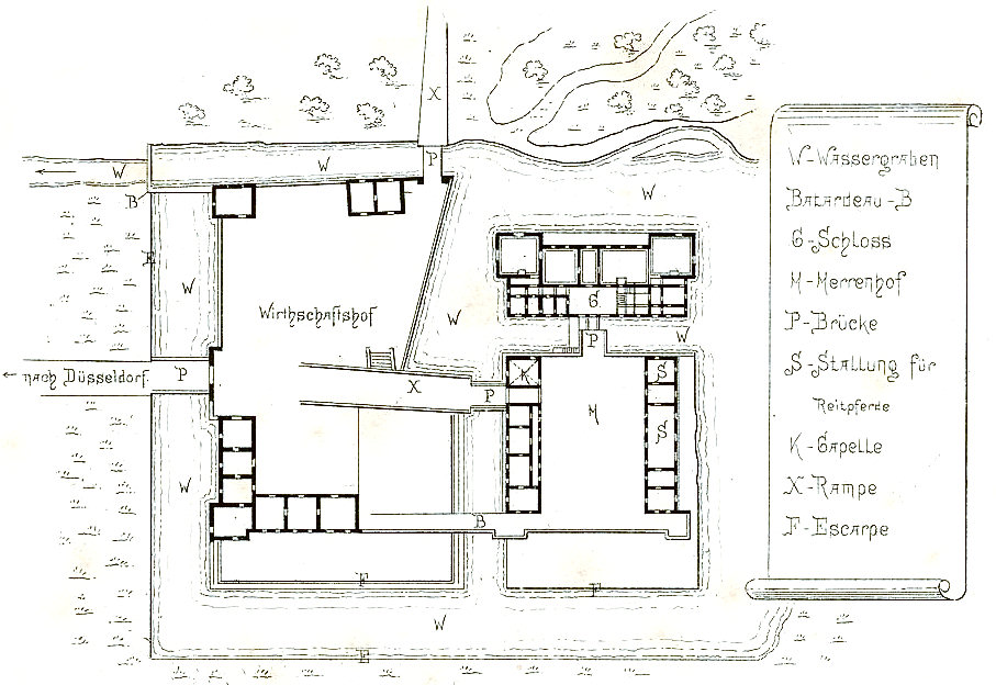 Grundriss des Schlosses Hugenpoet in Essen-Kettwig